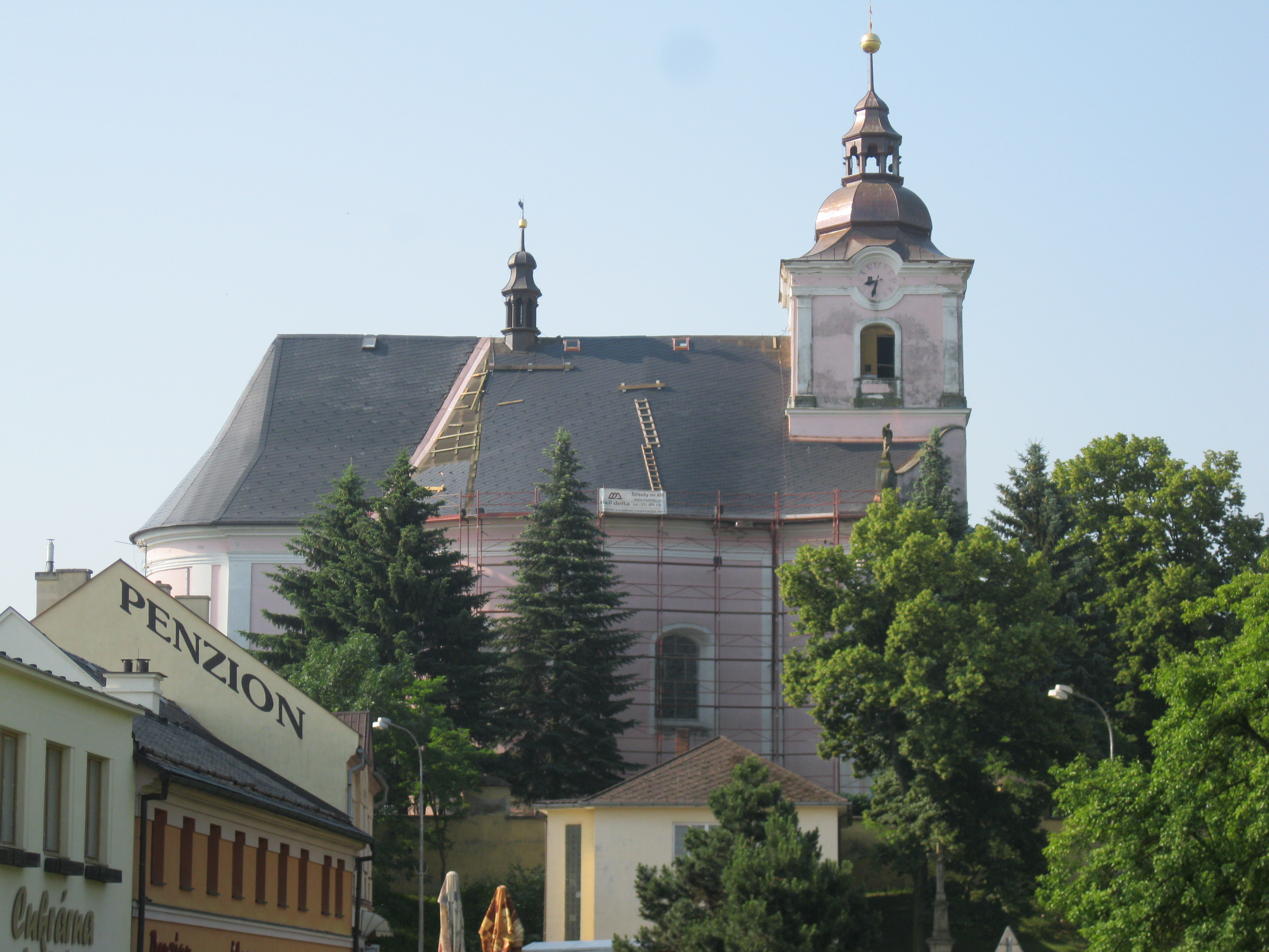 Kostel Nanebevzetí P. Marie (Slatinice), střed obce, Slatinice